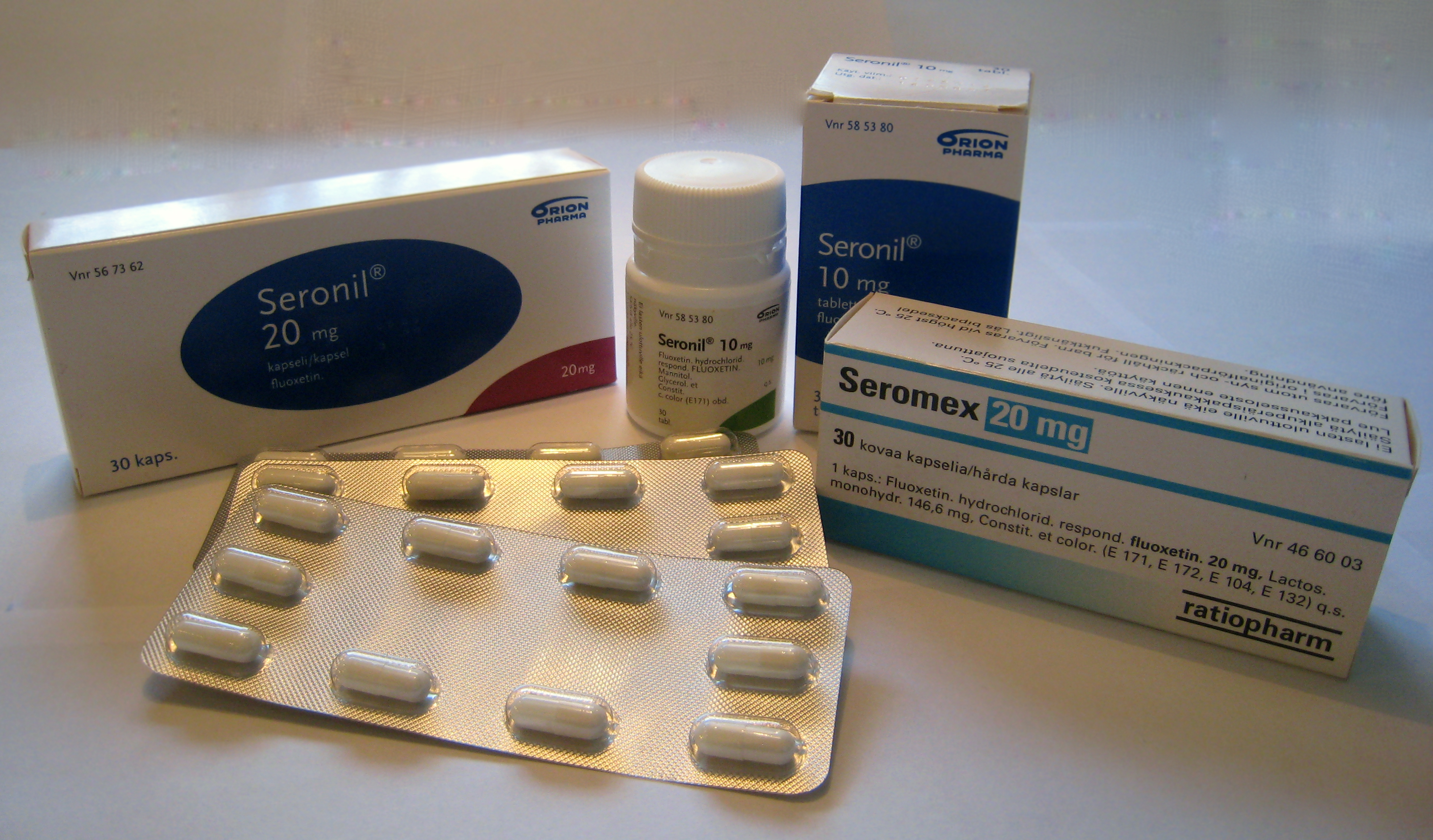 Fluoksetiiniin perustuvia lääkkeitä